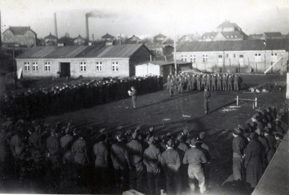 מפקד במחנה שבויים